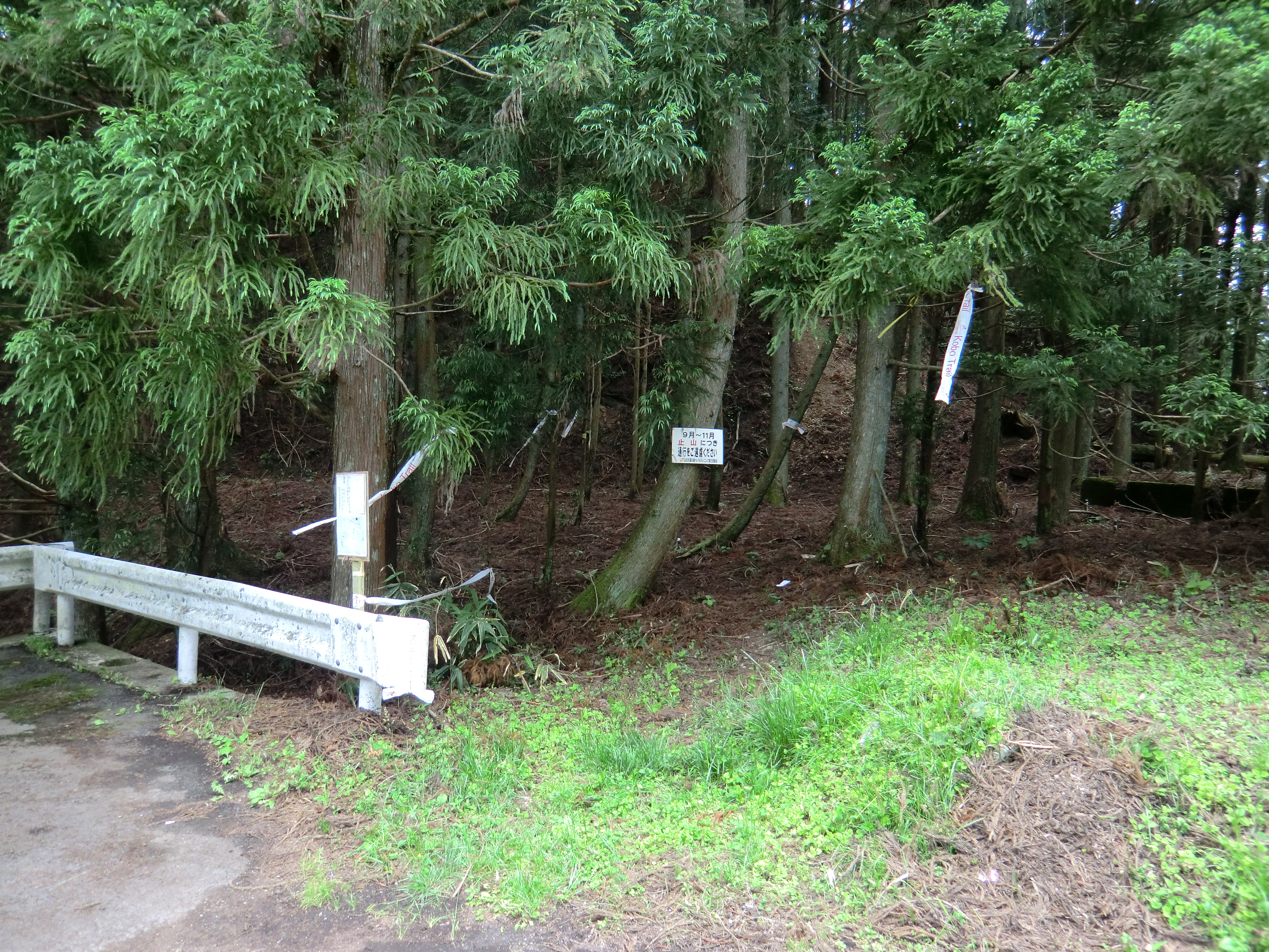 天辻峠付近、富貴方面への尾根道が分岐する。